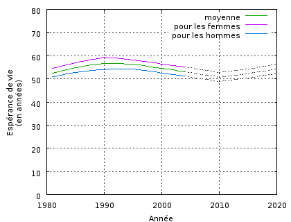 Graphique de l'évolution de l'espérance de vie au Togo de 1980 à 2020